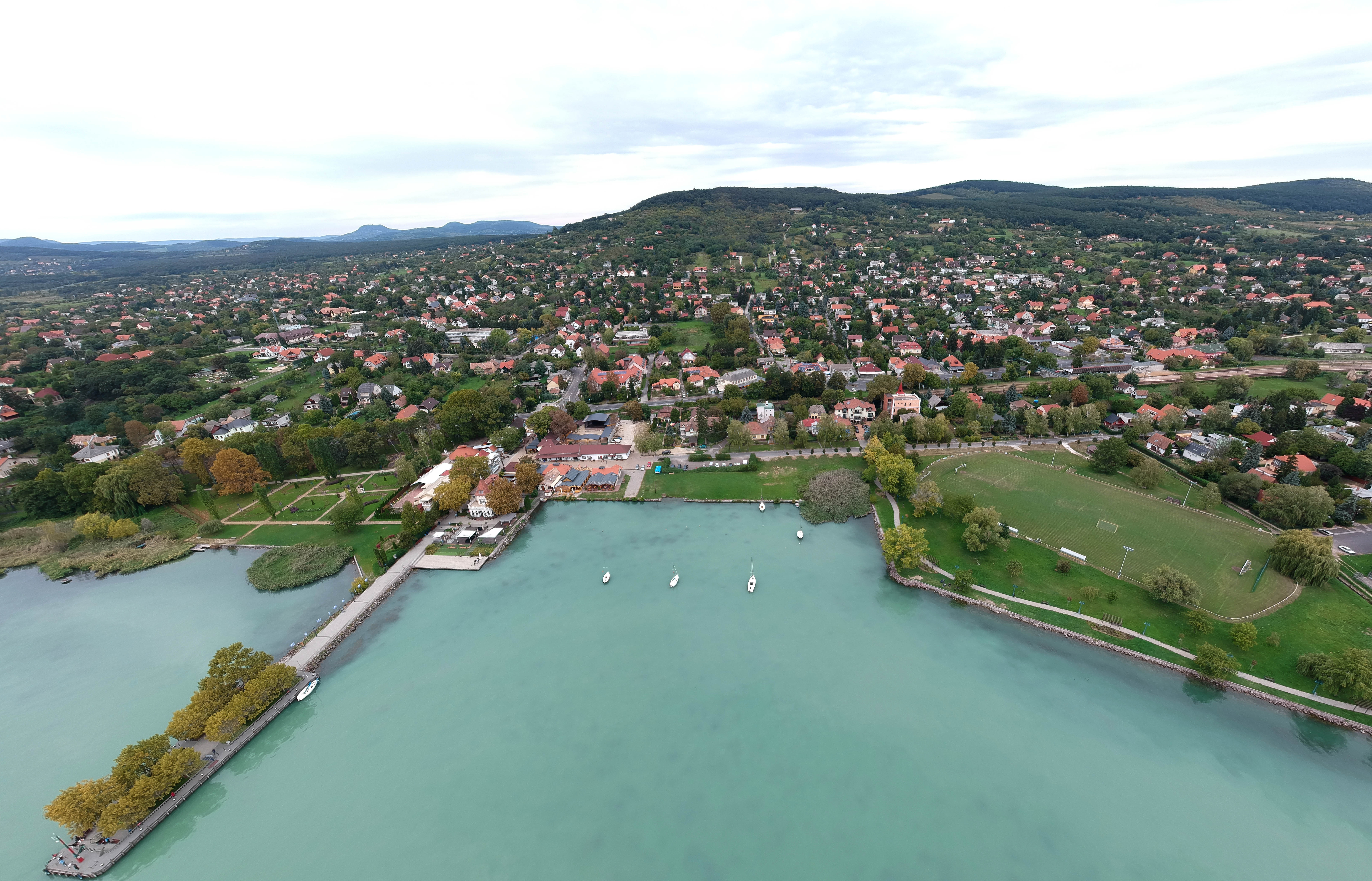 Balaton-átúszás révfülöpi starthelye. A Balaton-átúszás egy évente megrendezett nyári sportesemény, amelyet régebben július utolsó szombatján tartottak meg, de 2011-től július első szombatja a kitűzött időpont, amit kedvezőtlen időjárás esetén módosítanak